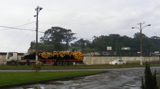 Estadio El Morro del club Naval, Talcahuano